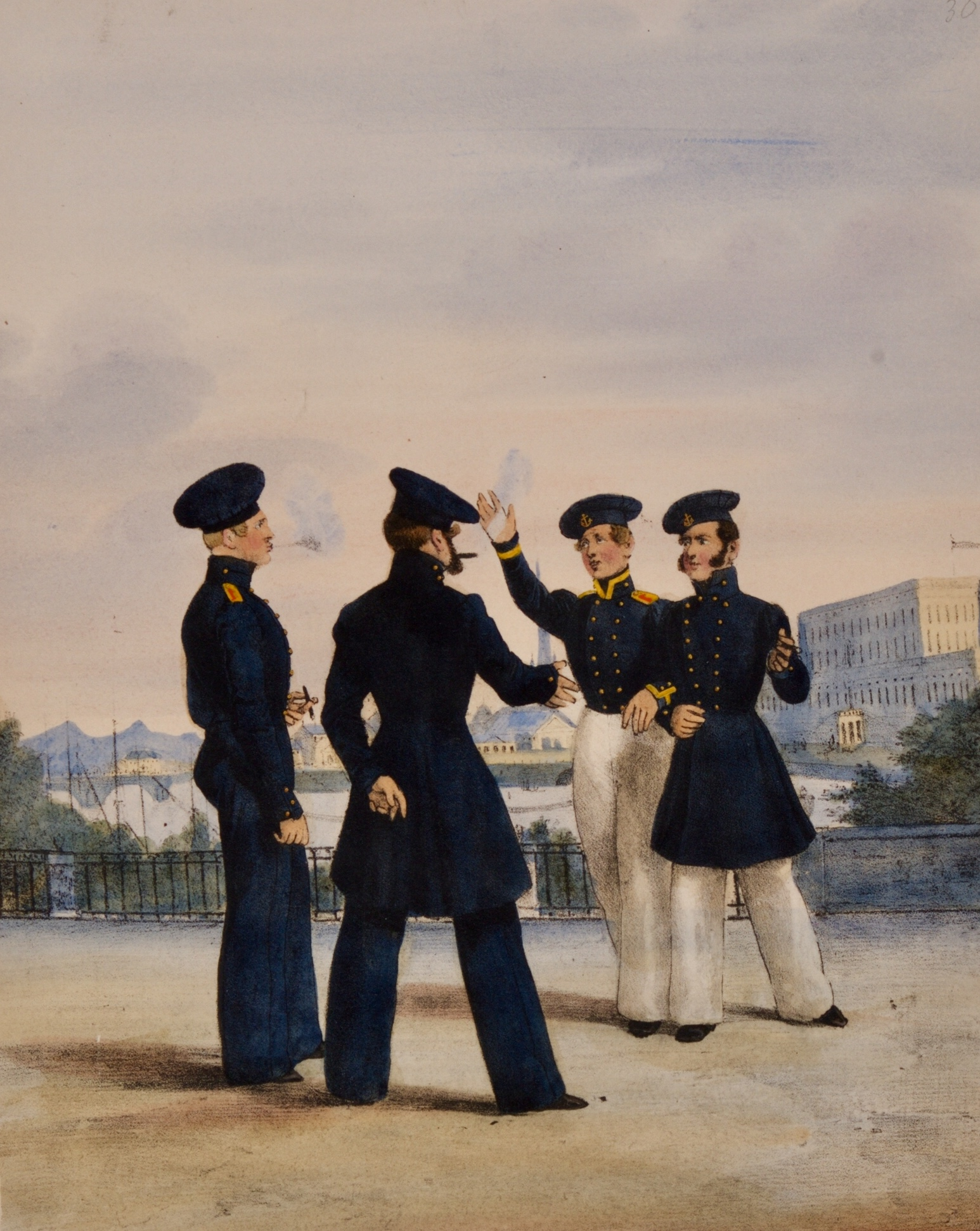 Tillhör Armémuseum.